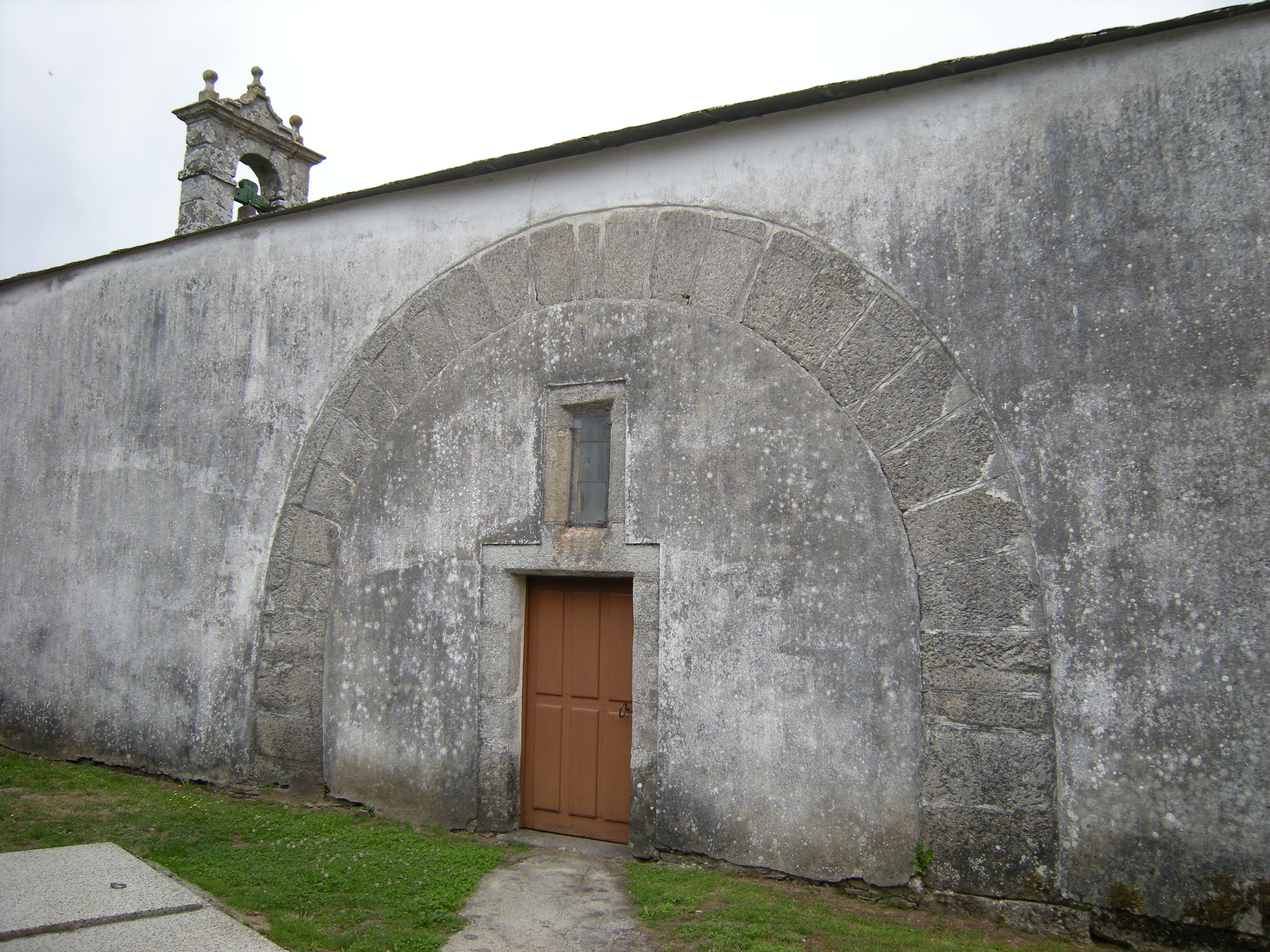 Muro sur de la nave.